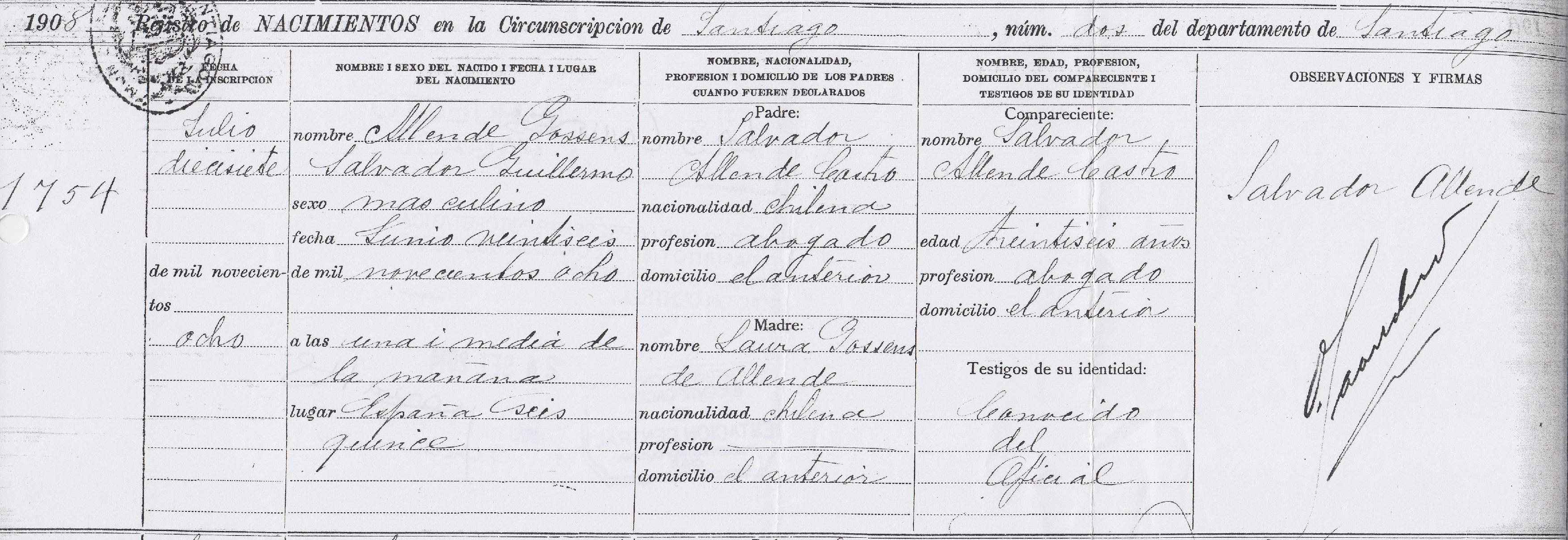 Partida de nacimiento de Salvador Allende Gossens